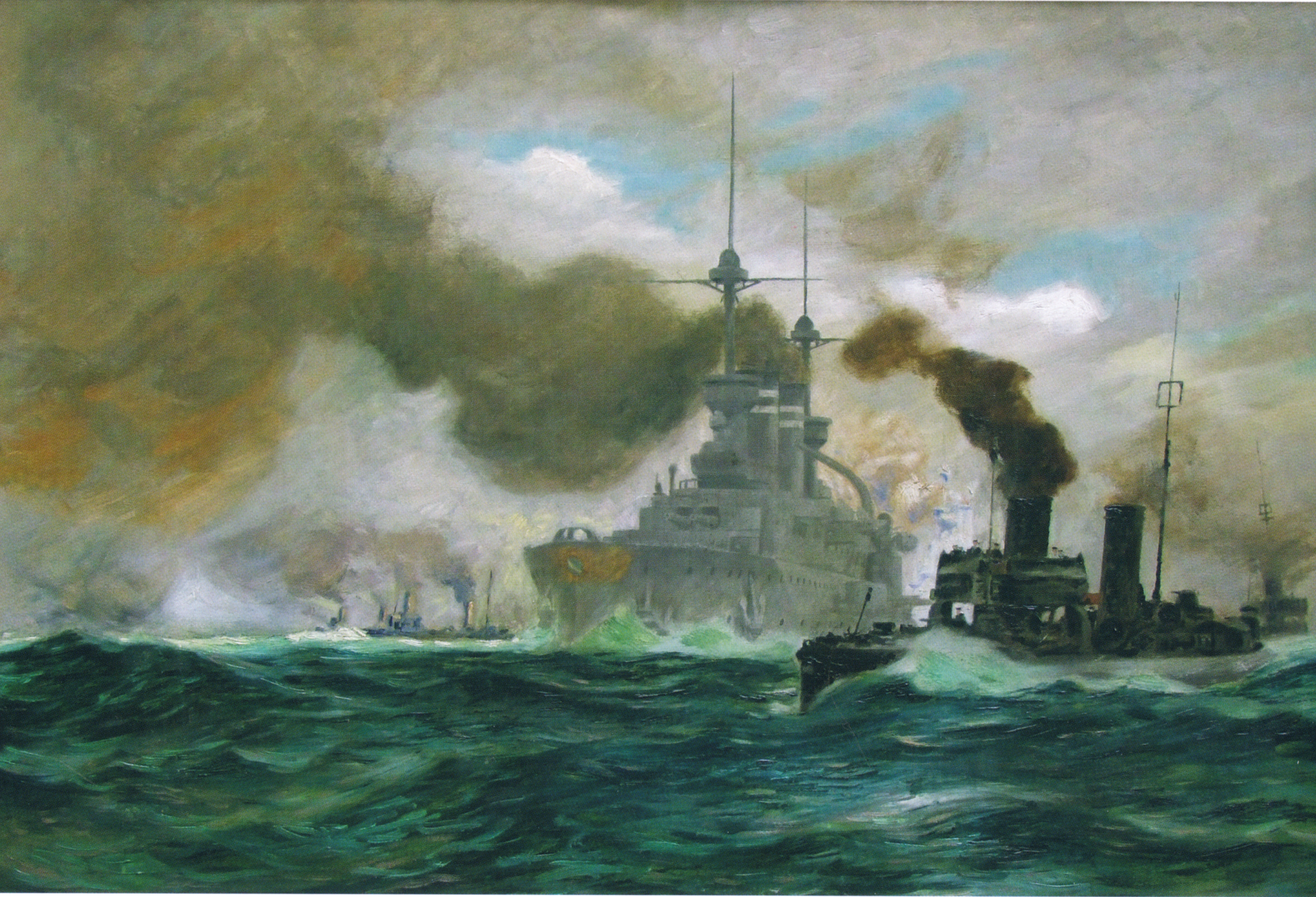 Das Linienschiff Zähringen im Manöver, Gemälde von Fritz Stoltenberg